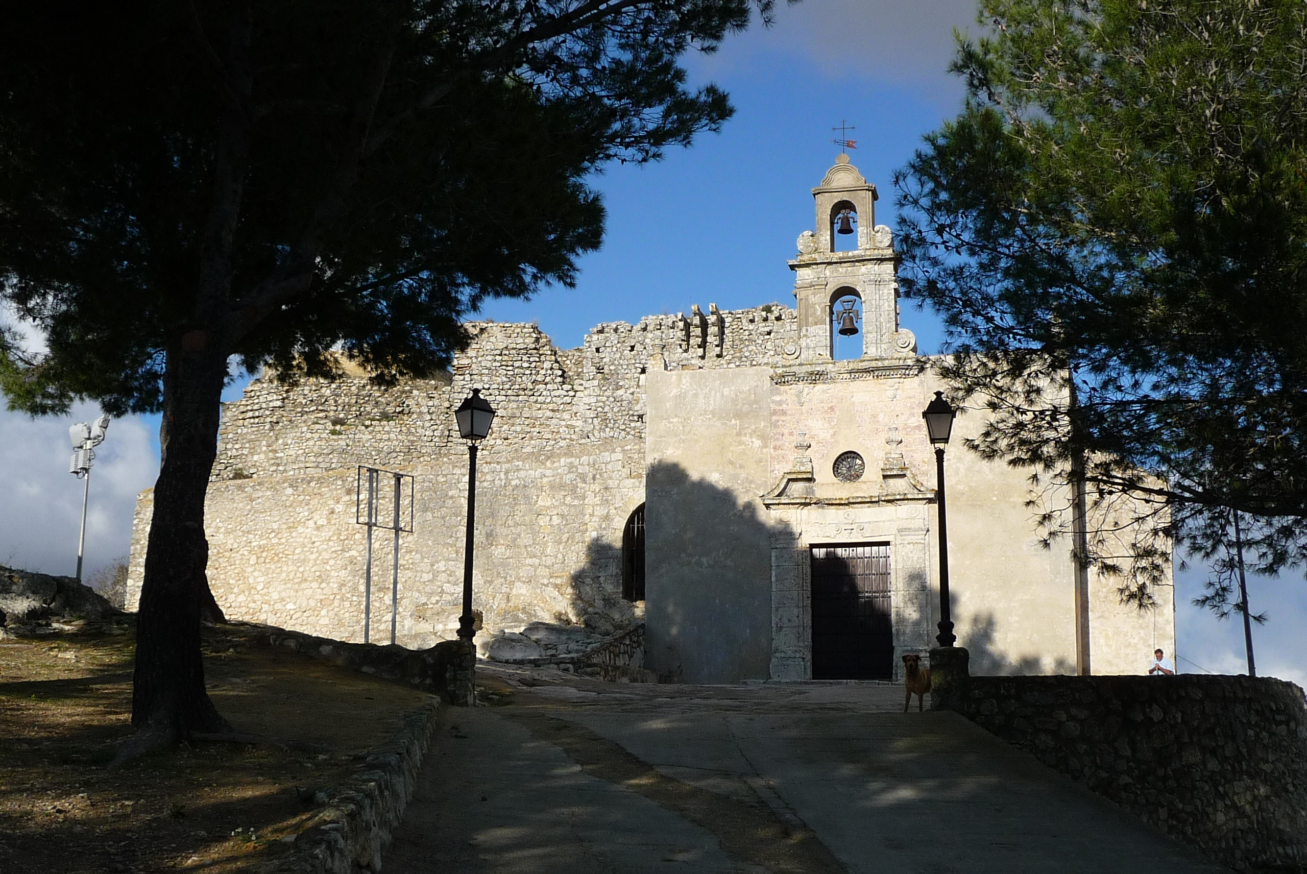 Espera (Andalusia, Spain).